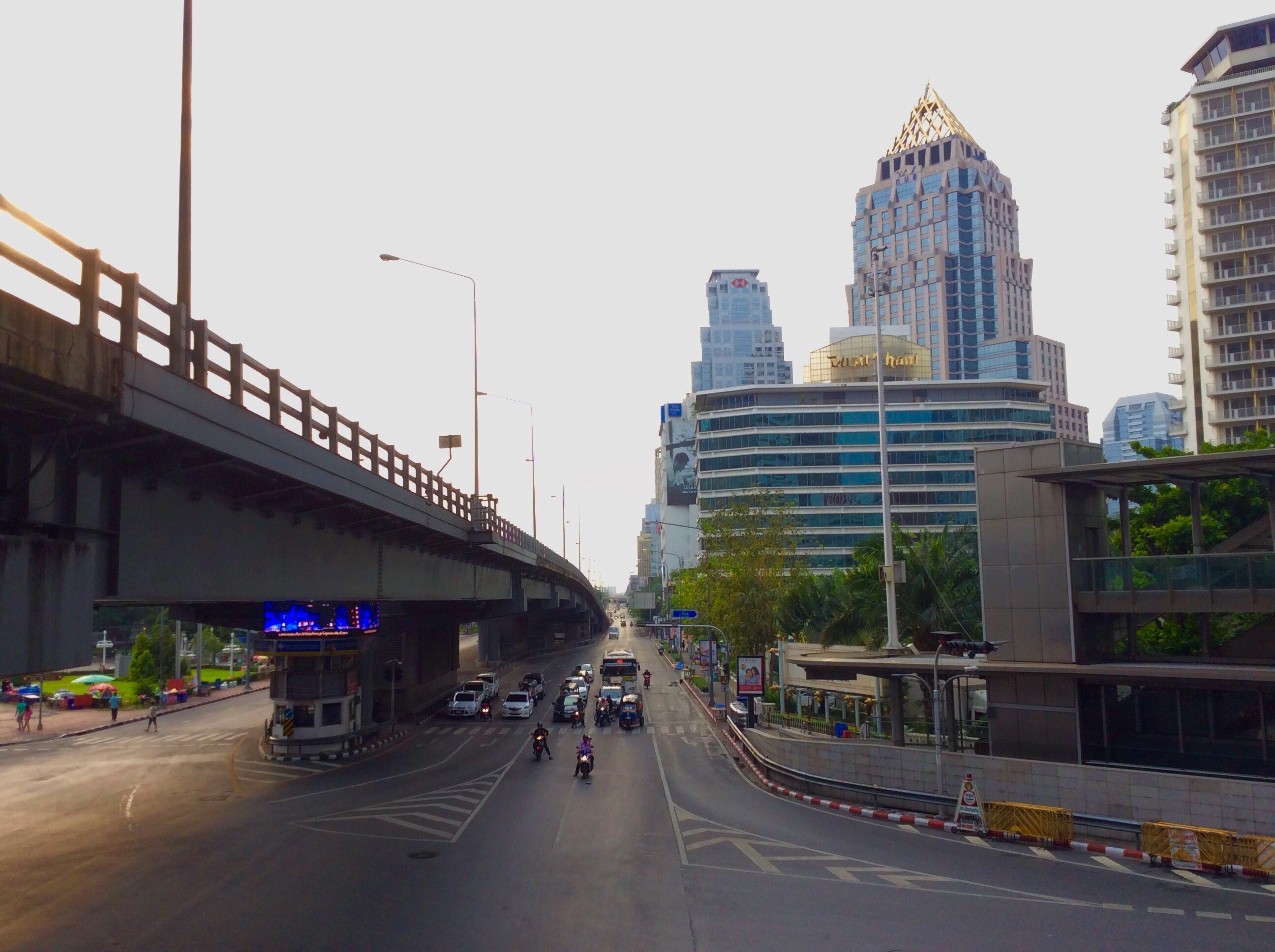 Rama4 road-Suriya Wong, Bang Rak, Bangkok, Thái Lan